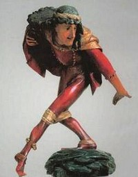 Figurine d'un des célèbres danseurs morisques qui servaient à décorer la vielle mairie de Munich en Bavière. L'original se trouve au musée de ville de Munich. La photo est celle d'une réplique d'une décoration dans un restaurant.